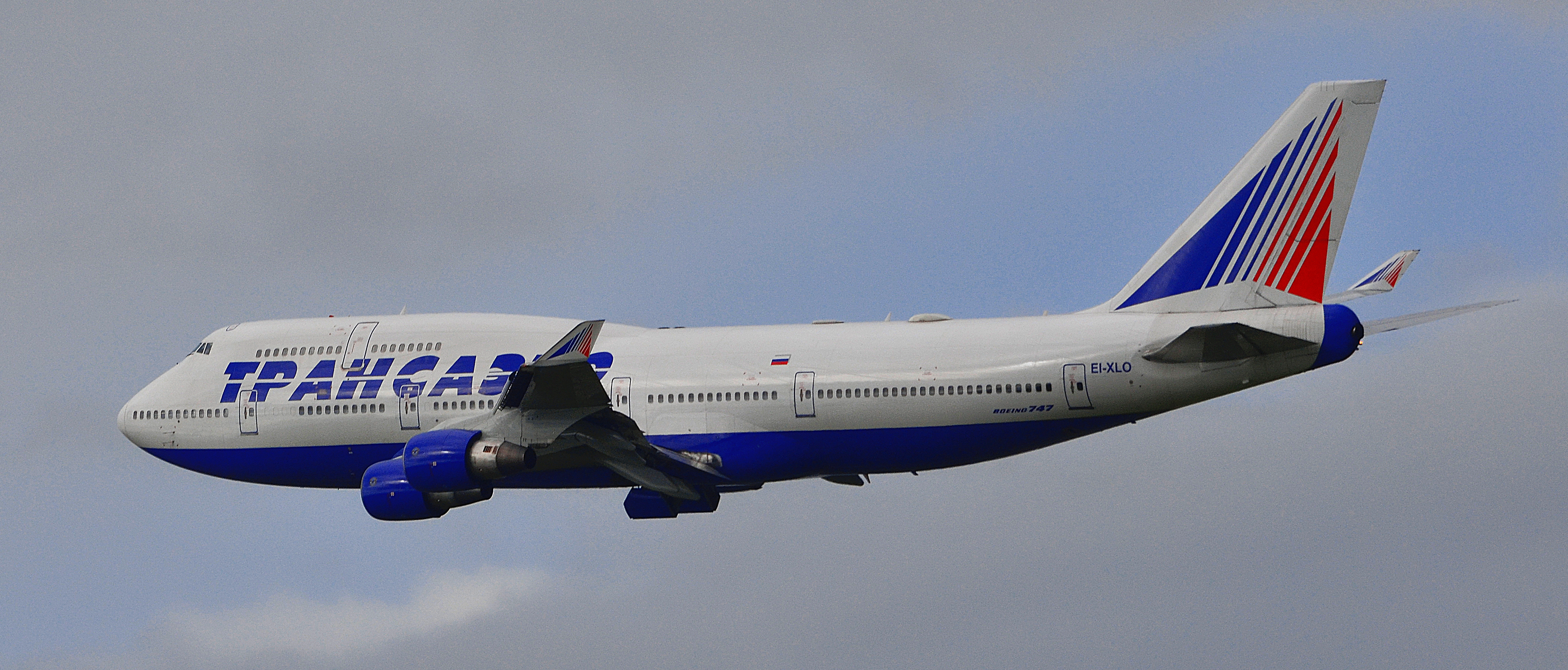 Можно увидеть здесь : You can see here